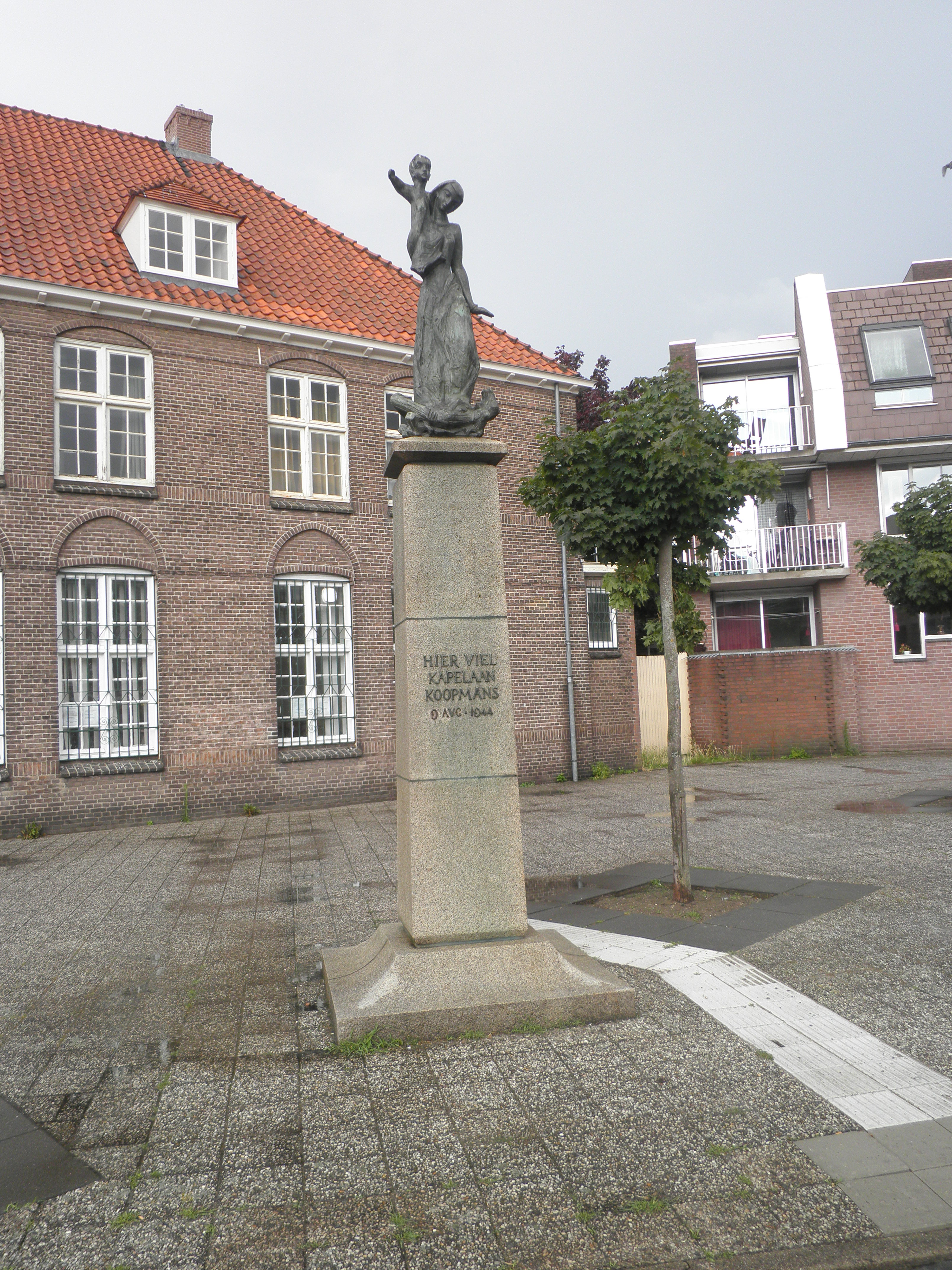 Beeld van Kapelaan Harrie Koopmans in brons door Peter Roovers aan het Kapelaan Koopmansplein in 's-Hertogenbosch